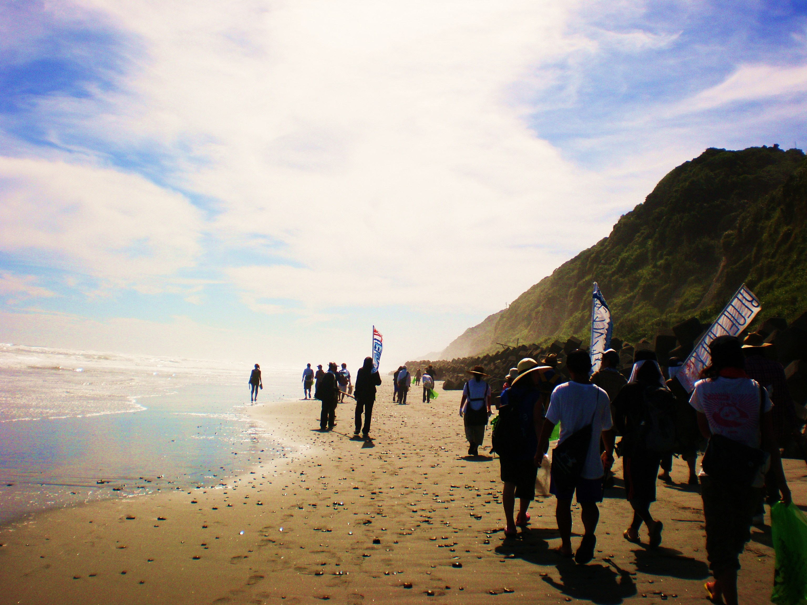 omotehamabluewalk_photos